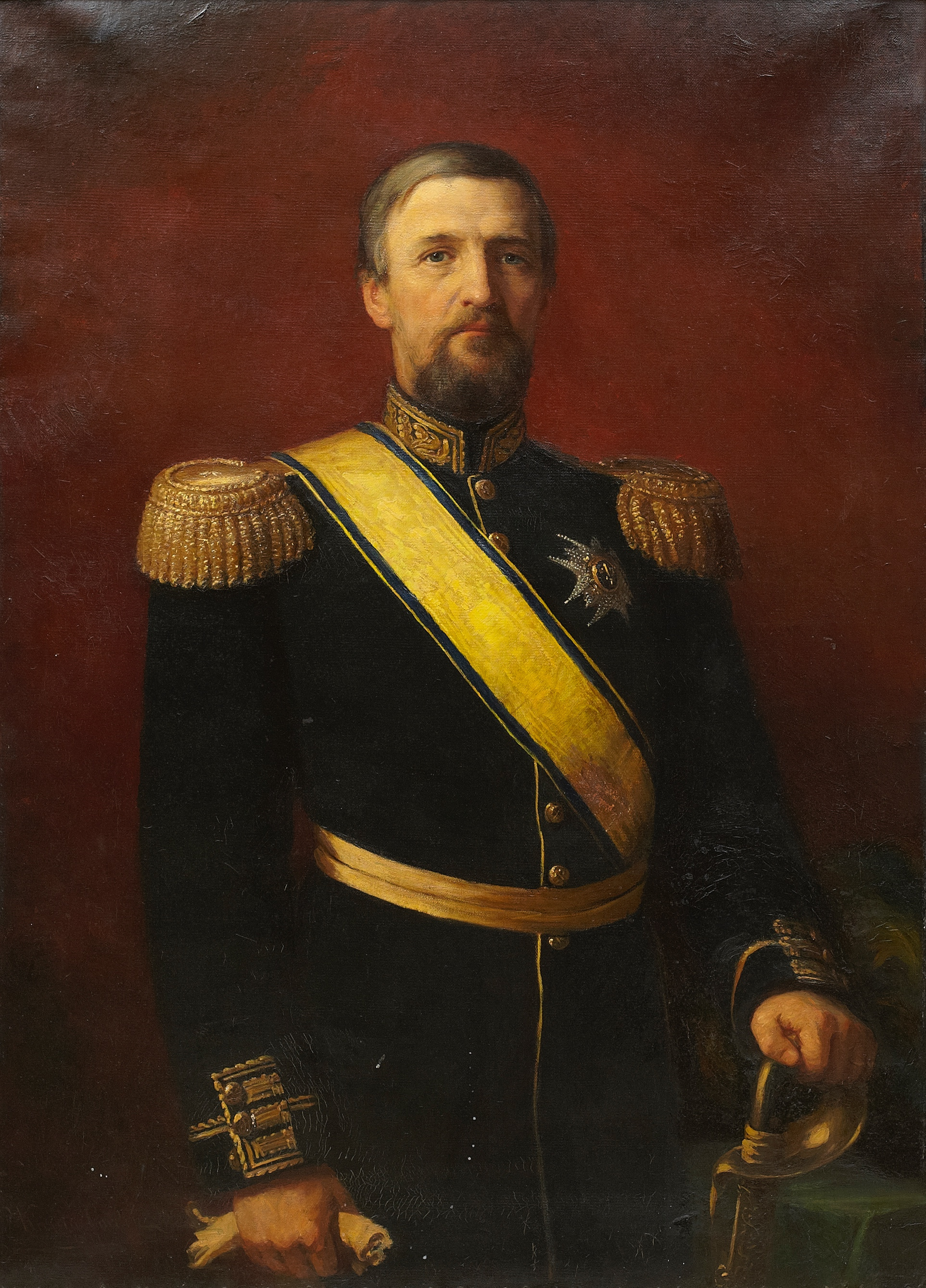 Porträtt av sjöminister Abraham Leijonhufvud iklädd uniform för en konteramiral. Över axeln syns Svärdsordens band, och på bröstet dess storkors kraschan. Målning utförd 1877 av Kerstin Cordon (1843-1924). Olja på duk, 136 x 98. Märkt a tergo: Abraham Leijonhufvud General Lieutenant f. 1823(-1911).